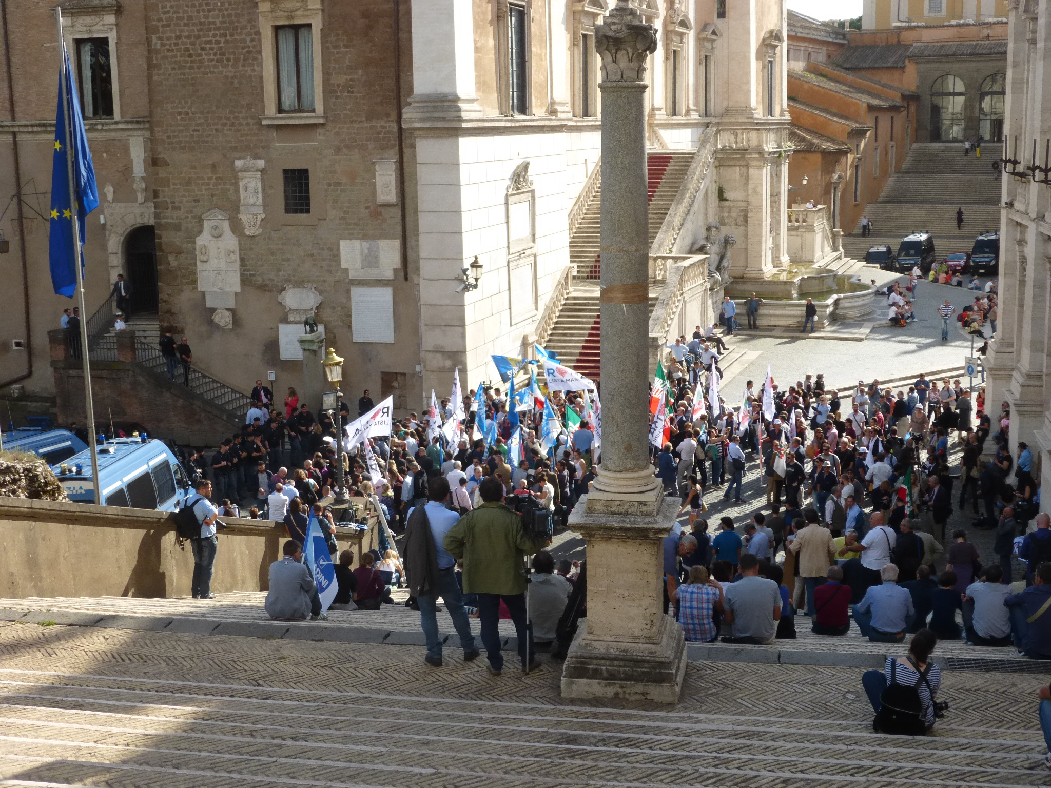 Roma, Palazzo senatorio e piazza del Campidoglio. Circa 40 manifestanti, 50 operatori dell'informazione, un tot di carabinieri, poliziotti e turisti, in attesa dell'annuncio delle dimissioni del sindaco Marino.